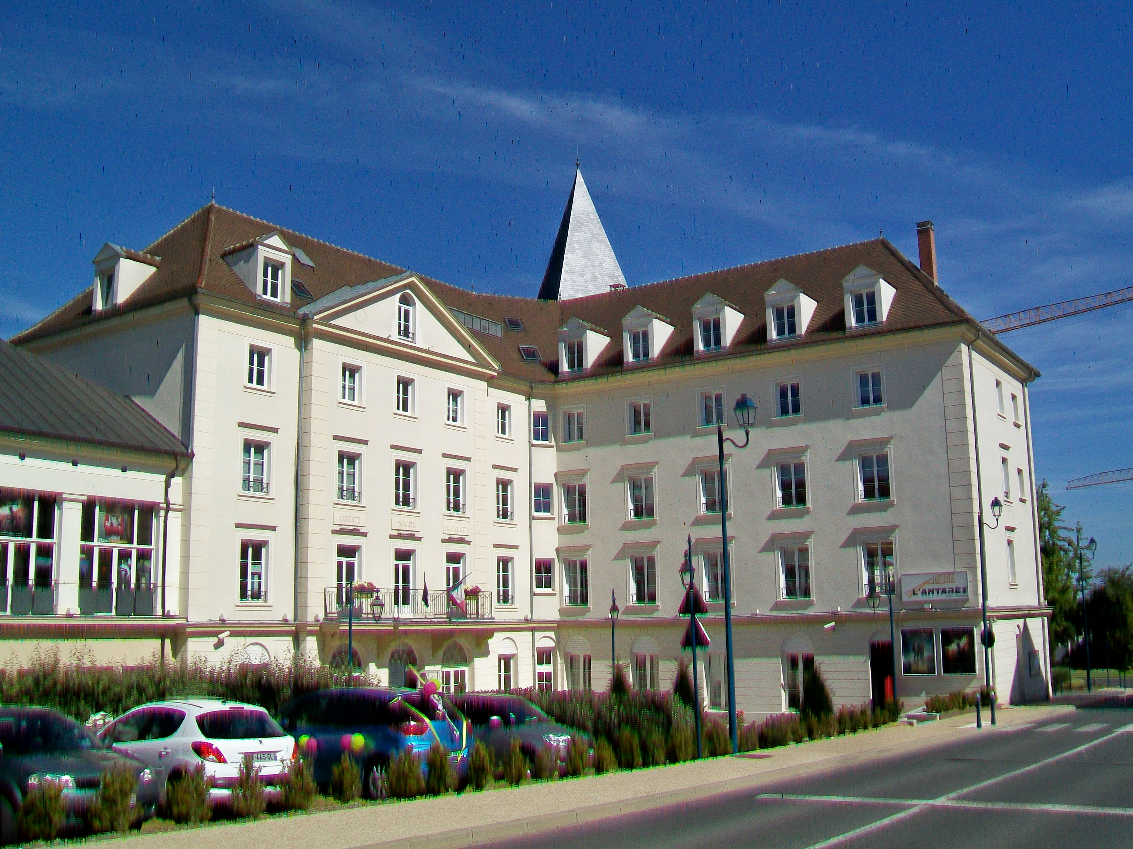 Le nouvel hôtel de ville, façades sud et ouest sur l'avenue Gandhi.